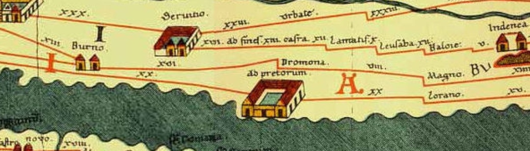 Dio Tabule Peutingeriane koji pokazuje dio ceste Vie Gabiniane između Burnuma i Magnuma.